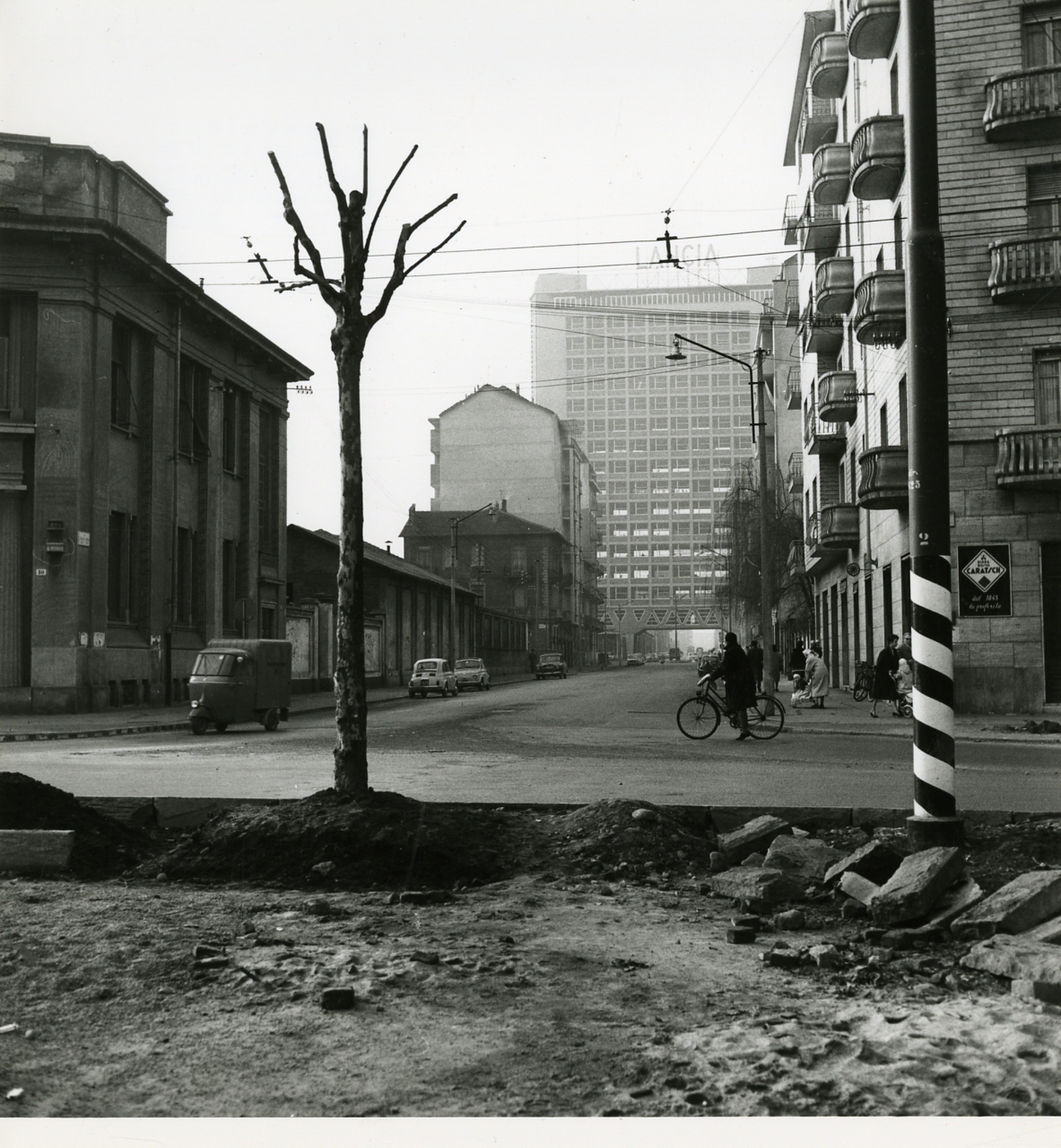 Servizio fotografico : Torino, 1981 / Paolo Monti. - Stampe: 2 : Positivo b/n, gelatina bromuro d'argento/ carta, 24x30. - ((Al verso delle stampe manoscritti i numeri dei negativi corrispondenti (formato 35 mm) con indicazione del fotogramma: 3615/25; iscrizioni didascaliche con annotazioni tecniche manoscritte a matita: "Torino/ Borgo San Paolo - Periferia/ in trasformazione/ [...]"; timbro a inchiostro con copyright (Corso Sempione - Milano). - Sul coperchio della scatola iscrizione didascalica manoscritta a pennarello nero: "Architettura/ Lombardia Veneto". - Fonte: Agenda di Paolo Monti: Nikon Leika 3001-/ Monti 1978 (1978-1982), presso Archivio Paolo Monti